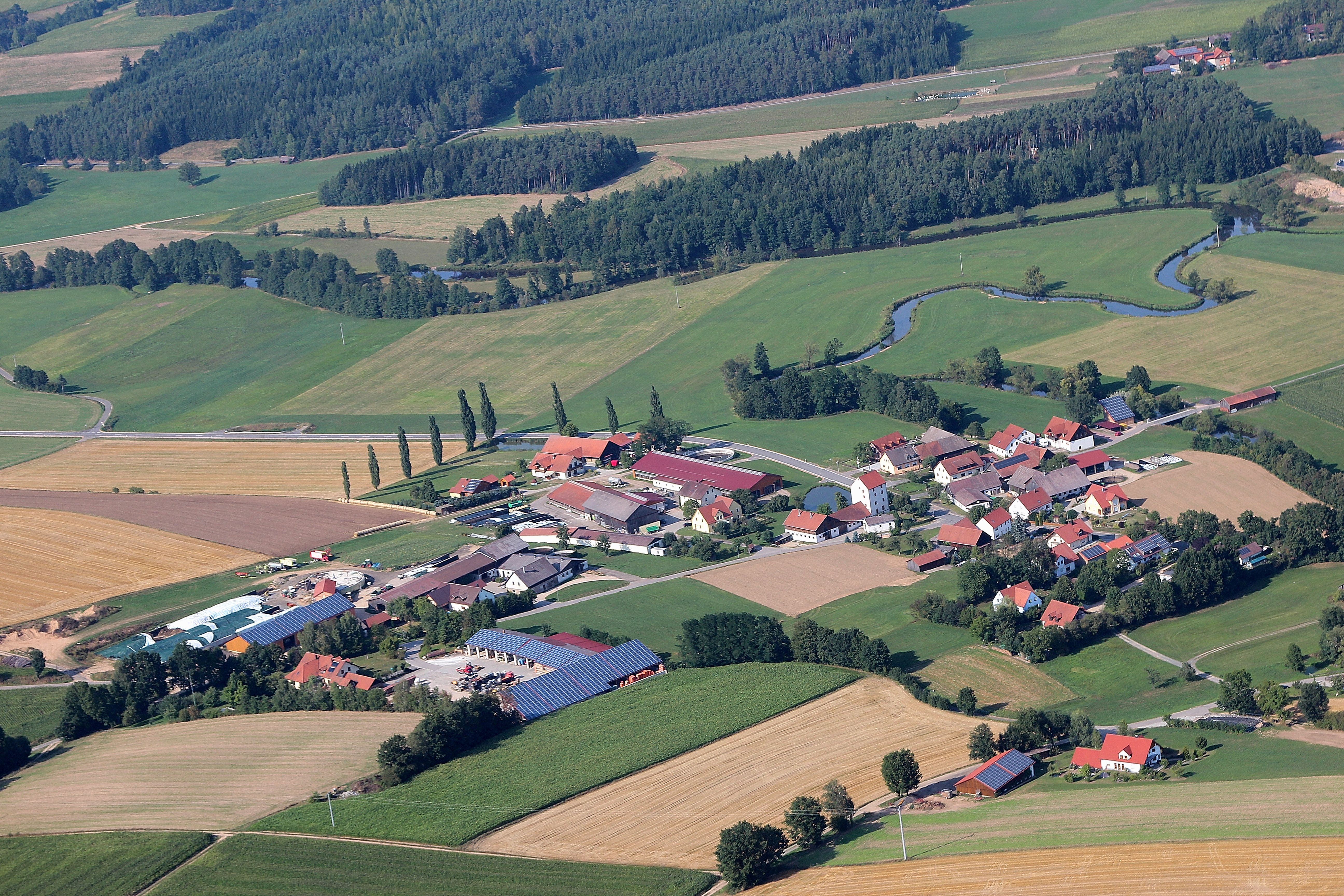 Pettendorf, Stadt Neunburg vorm Wald, Landkreis Schwandorf, Oberpfalz, Bayern